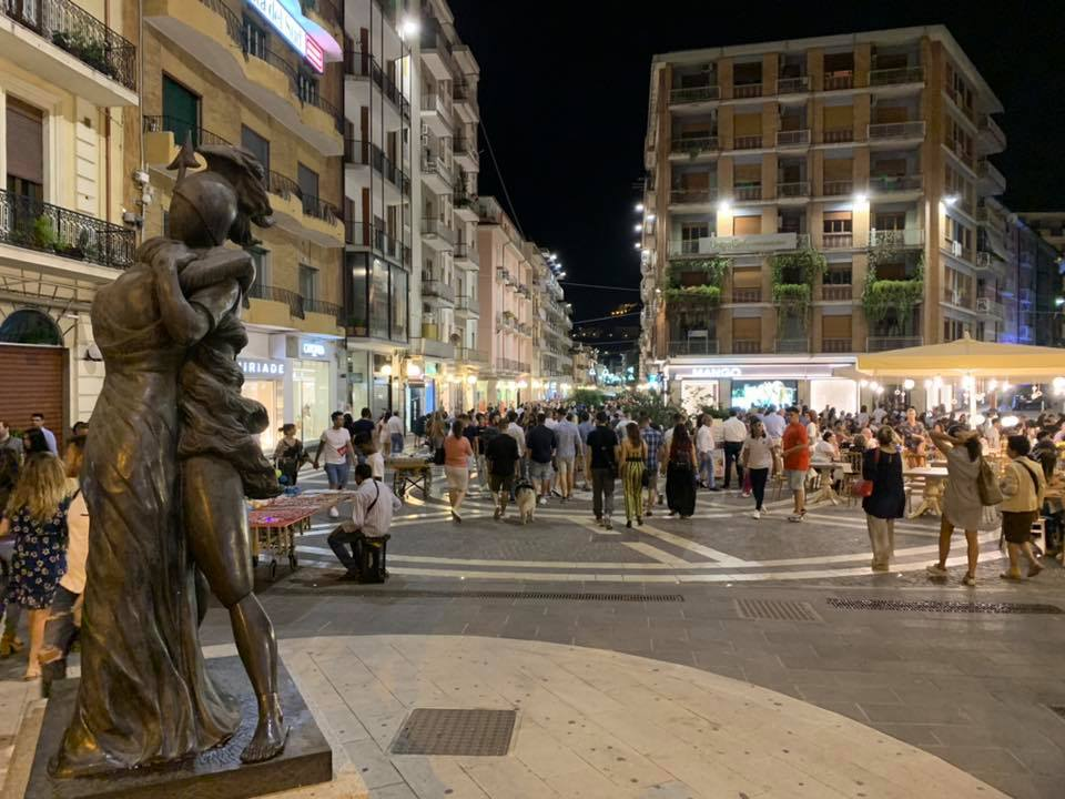 Piazza Kennedy a Cosenza in una serata estiva